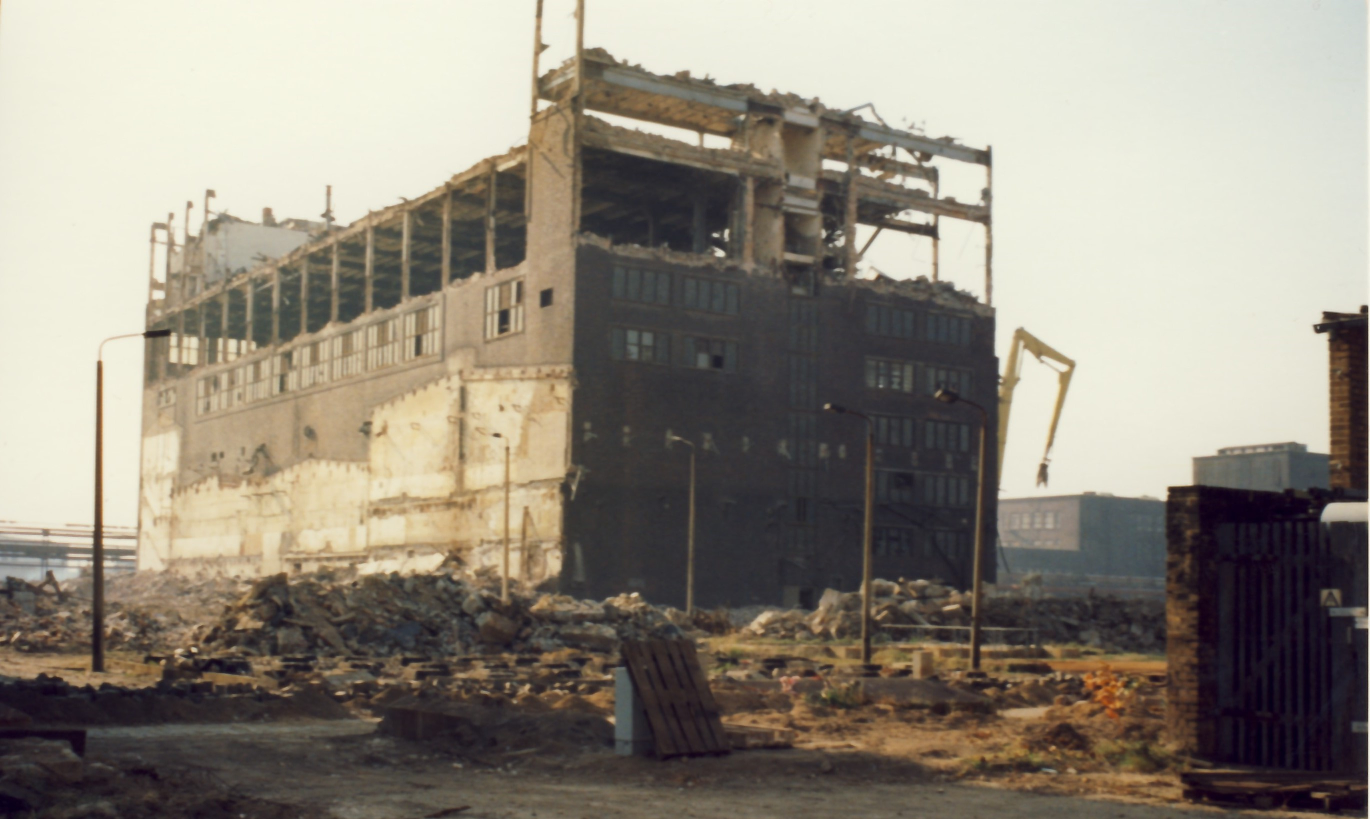 Rückbau des Faser-Hochhauses Geb. 621 im Jahr 1994